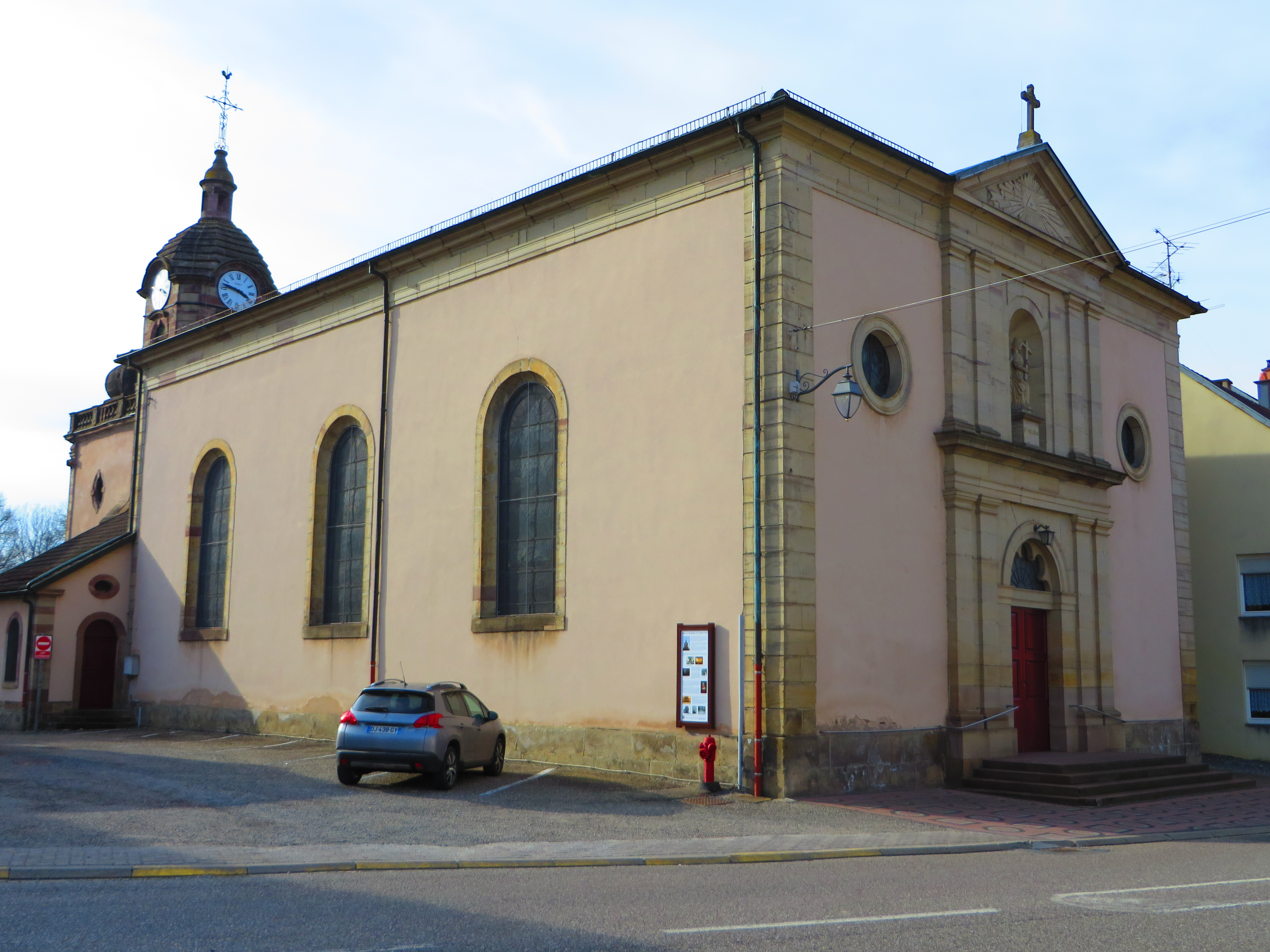 Niderviller eglise